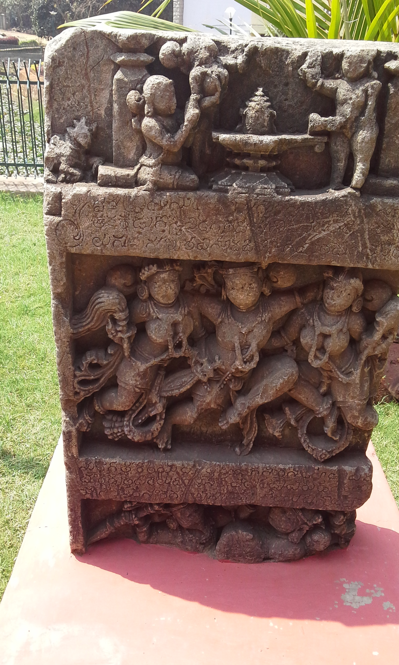 वीरगळ